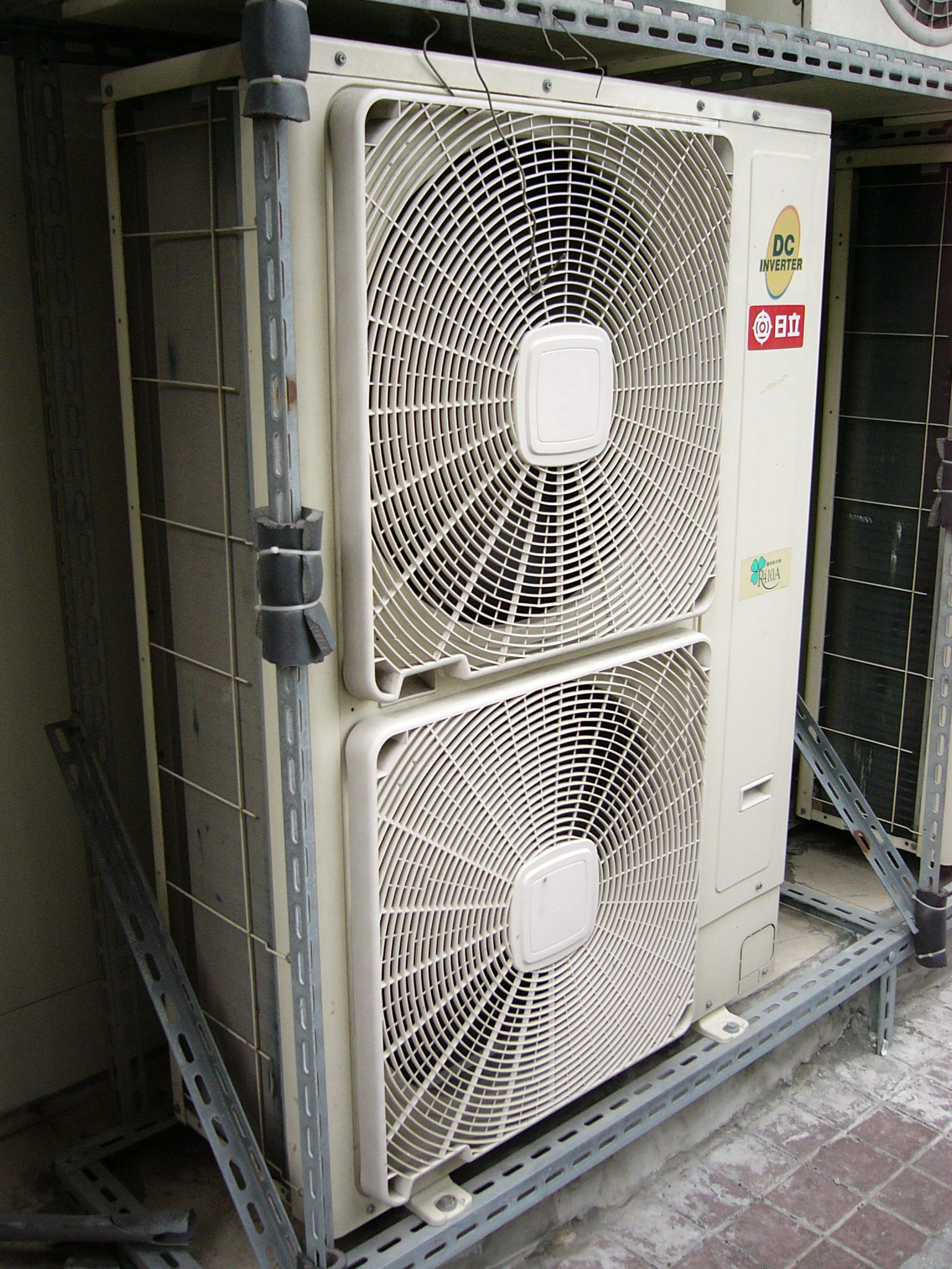 2008年製造的日立分離式變頻空調室外機RAM-5DNS